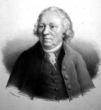 Johann Georg Büsch